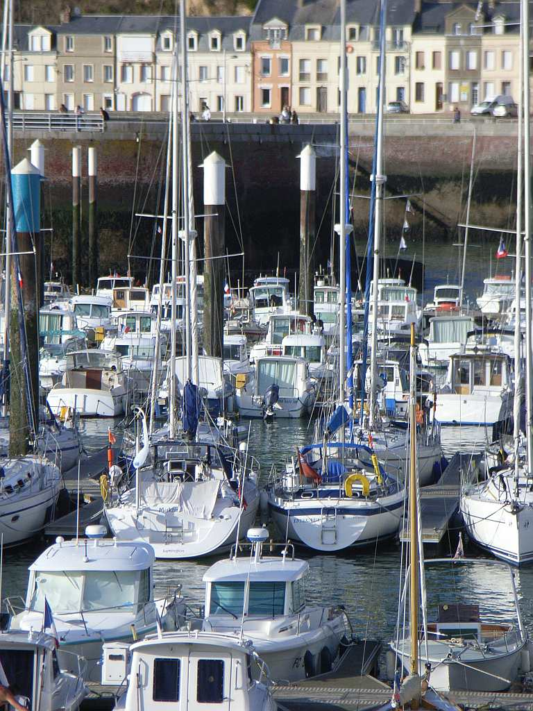 port de fecamp